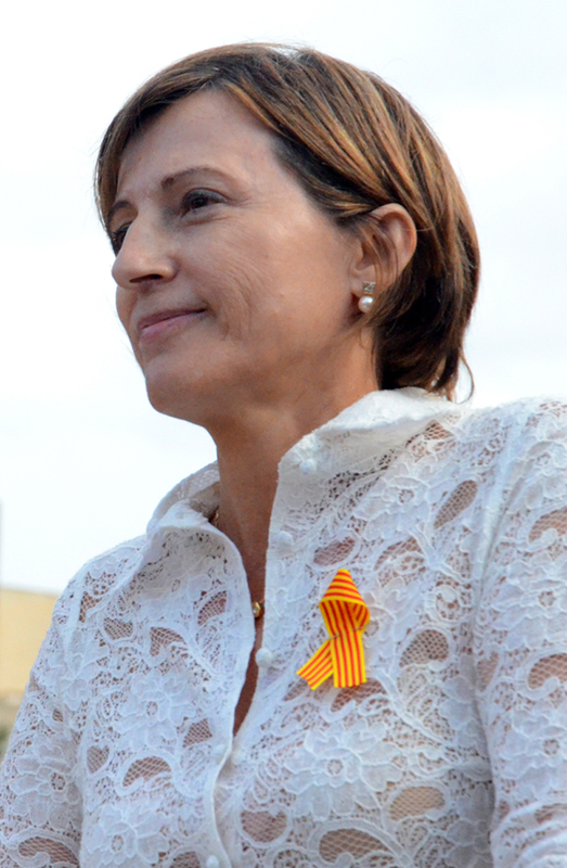 Carme Forcadell. La Via Catalana a Barcelona. Plaça Catalunya.